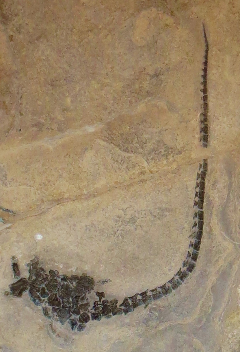 Fossil of Psephoderma, an extinct reptile- Took the picture at Museo di Scienze Naturali, Bergamo